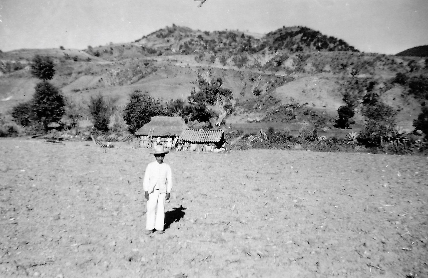 Jacales de doña Laura Bautista López, San Juan Achiutla, Oaxaca, México, 1945